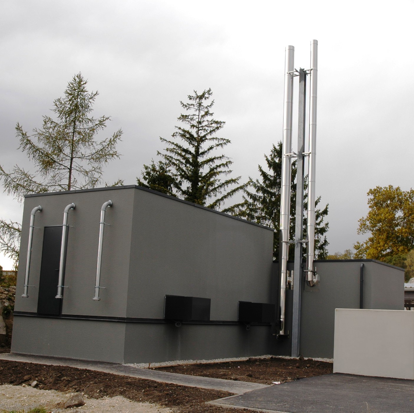 Biomasseheizwerk der EVN Wärme mit einer Leistung von 300 kW als Modulanlage [1] [2] ↑ [1] Gebrauchsmusterurkunde ↑ [2] úžitkových vzorov